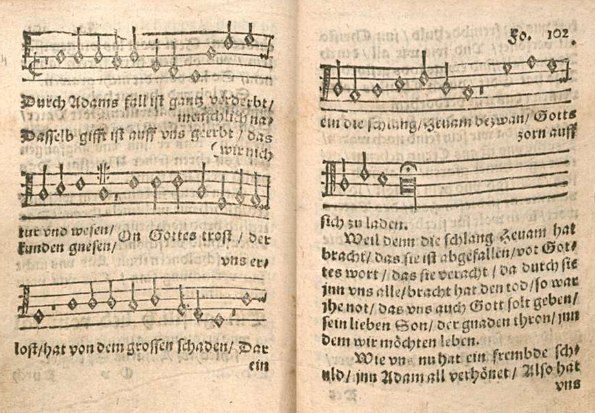 Lazarus Spengler's hymn Durch Adams Fall ist ganz verderbt from Martin Luther's Geistliche Lieder, printed in Wittenberg by Joseph Klug, 1535